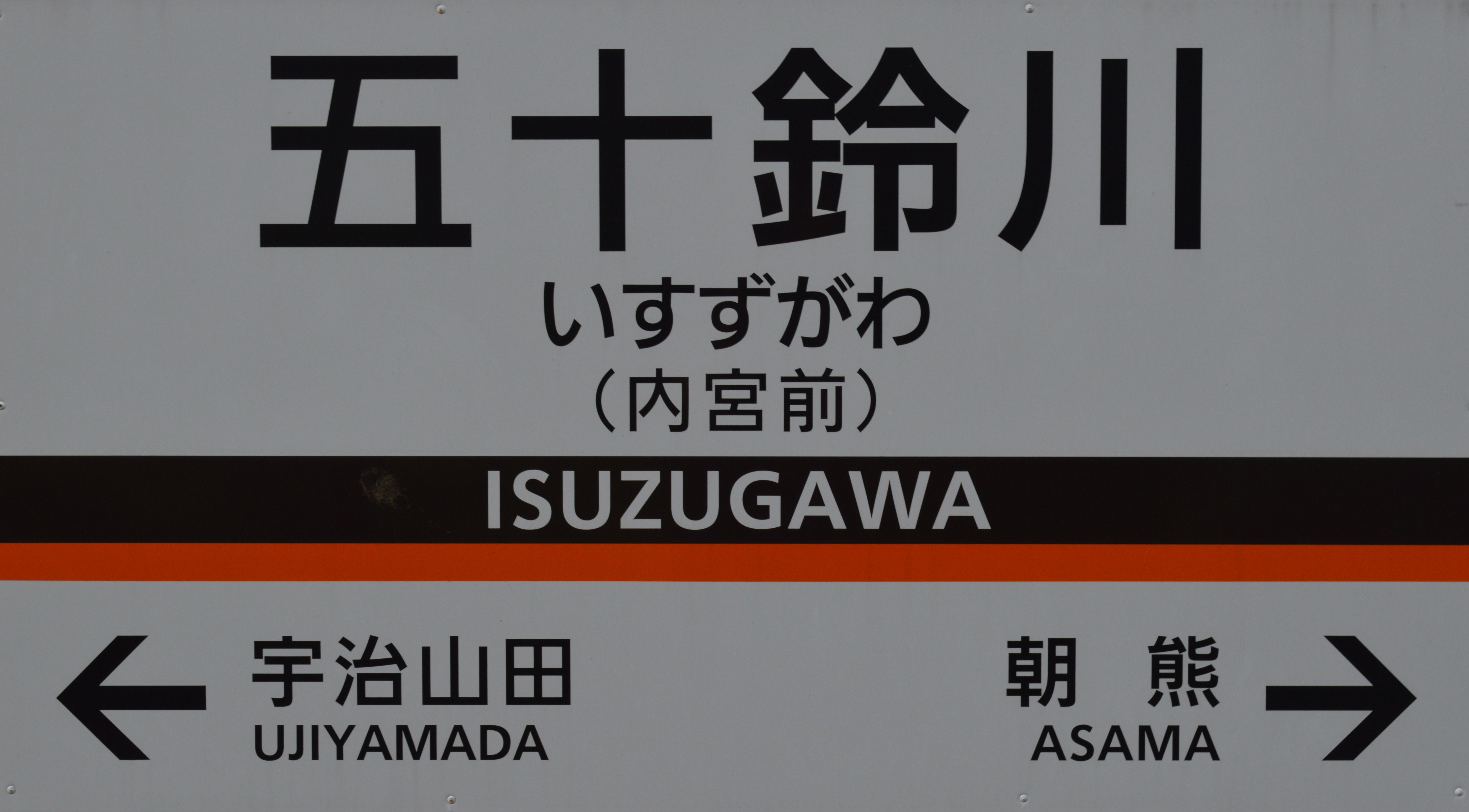 近鉄鳥羽線五十鈴川駅の駅名票